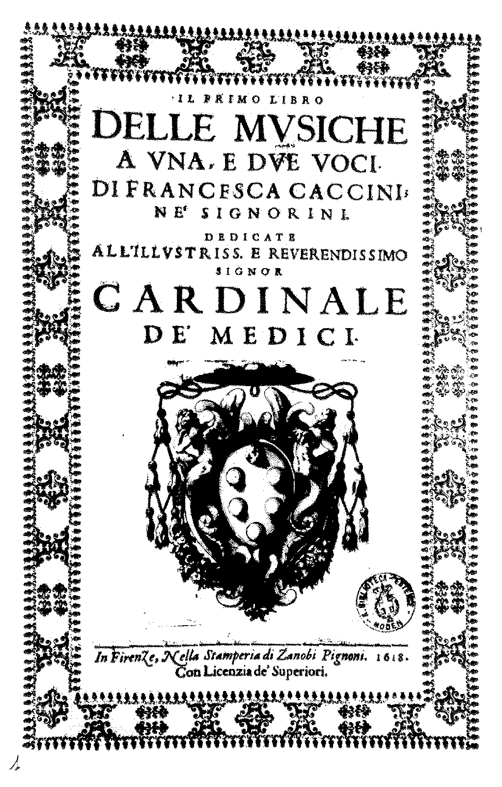 Primo Libro delle Musiche, Florence: Zanobi Pignoni, 1618.